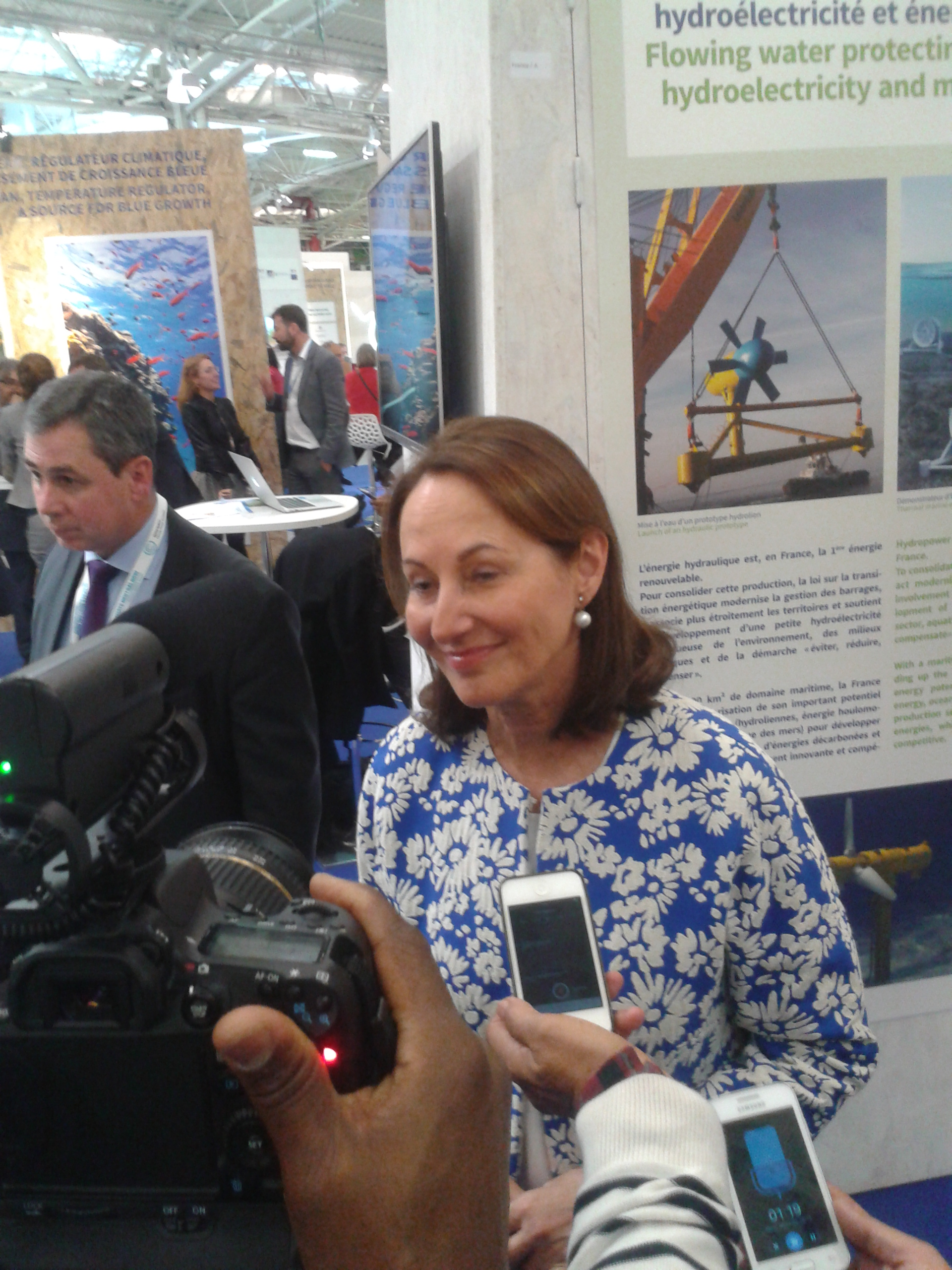 Ségolène Royal répondant aux questions des journalistes à la COP21, après la signature du partenariat pour la transition énergétique entre la France et la Banque européenne d'investissement.